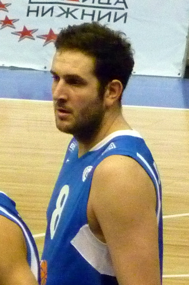 Форвард БК «Енисей» Драган Лабович в матче против БК «Нижний Новгород» 18 декабря 2010 года